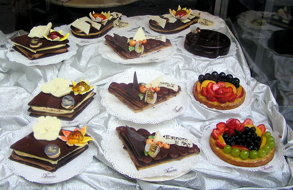 Auslagen in einer italienischen Konditorei in Perugia